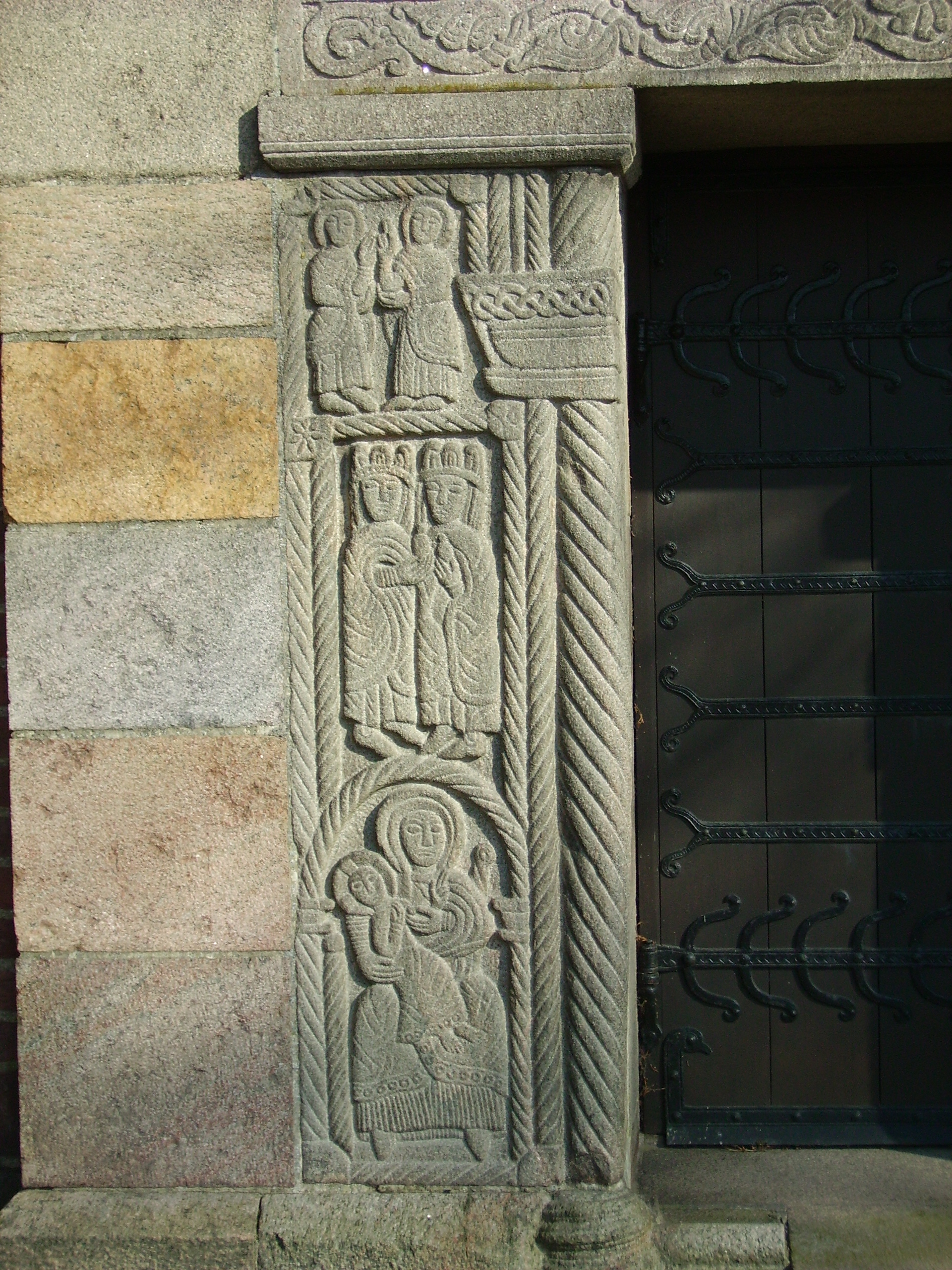 Vejlby Kirke,Norddjurs Kommune. Hårders protal left side